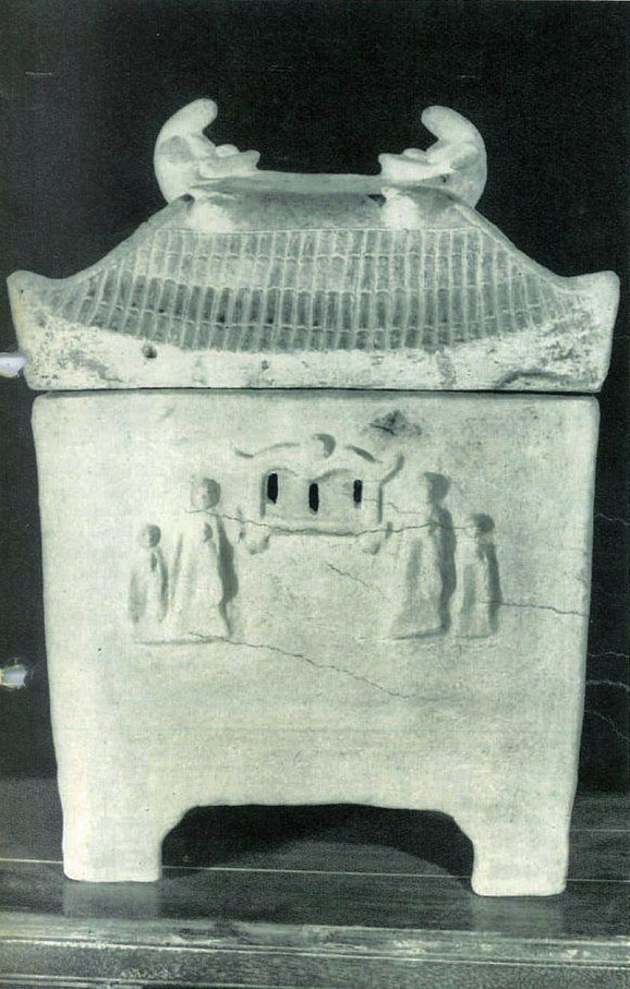 赤焼御殿型厨子甕、乾隆41年（1776年）7月6日銘